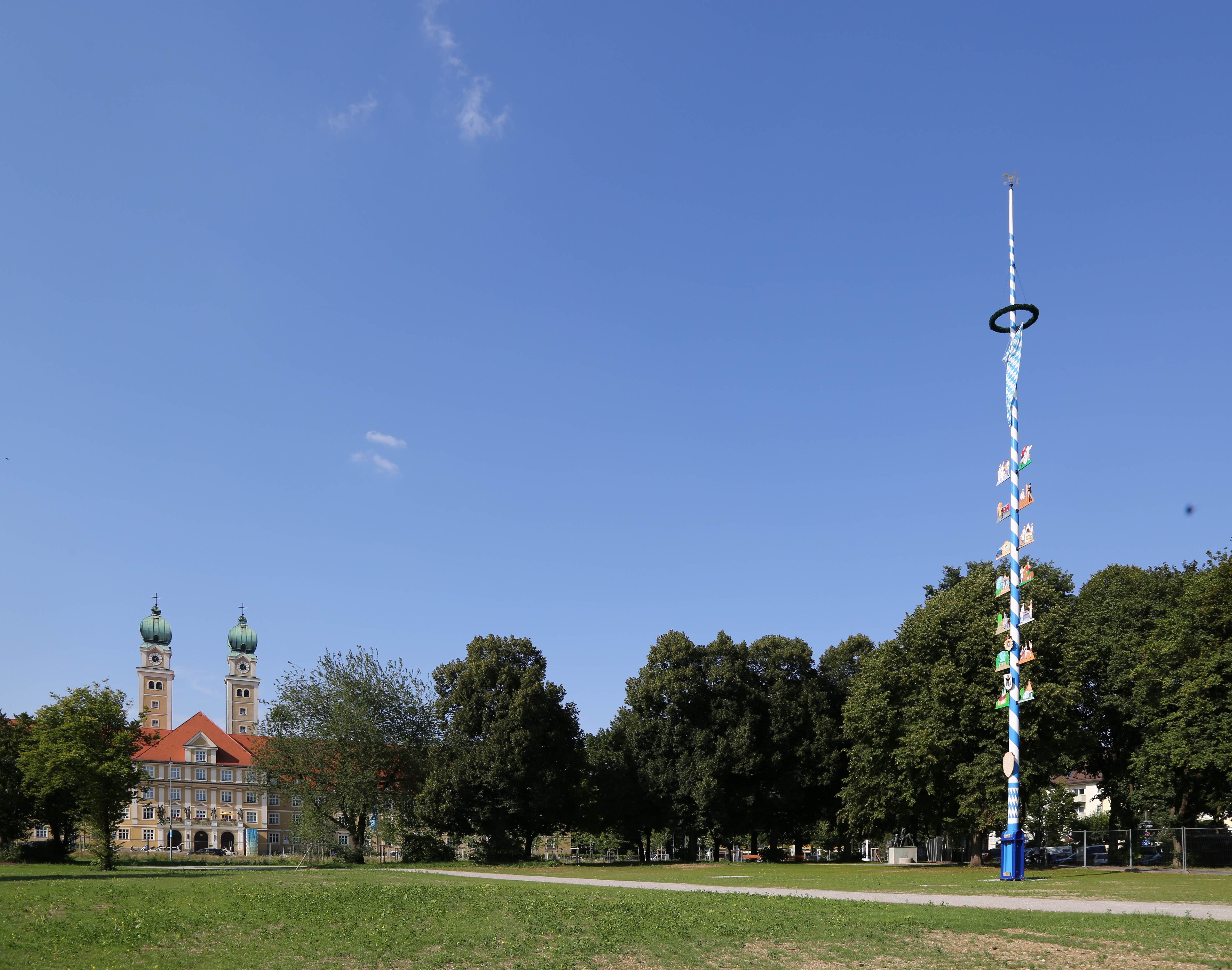 Luise-Kiesselbach-Platz in München. Neugestaltung nach dem Bau des Straßentunnels.Das Bild zeigt den Maibaum des Stadtbezirks Sendling-Westpark und das Altenheim St. Joseph